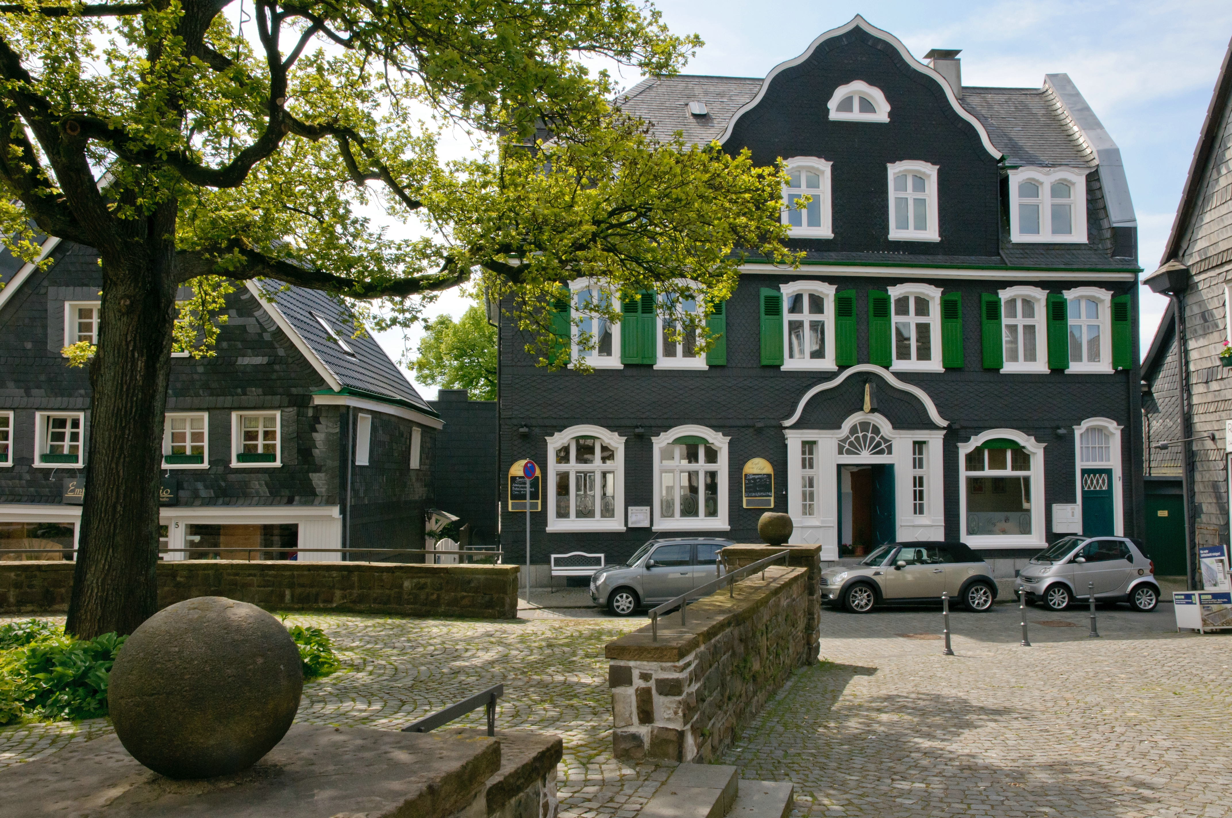 Cafe vom Cleff , Wuppertal Cronenberg